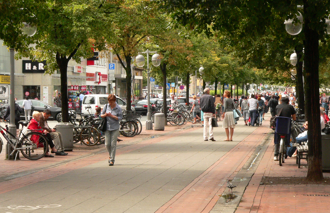 Georgstraße Hannover Richtung Steintor